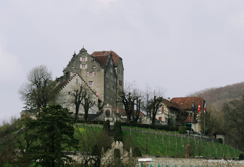 Schloss Wildegg, Aargau, Schweiz